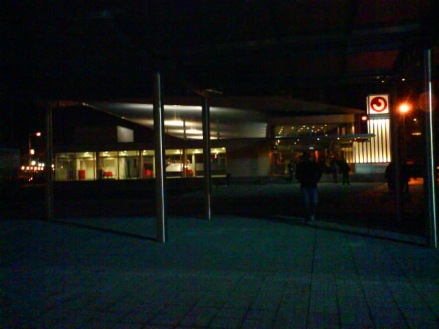 Santurtziko geltokia (Renfe Aldiriak).